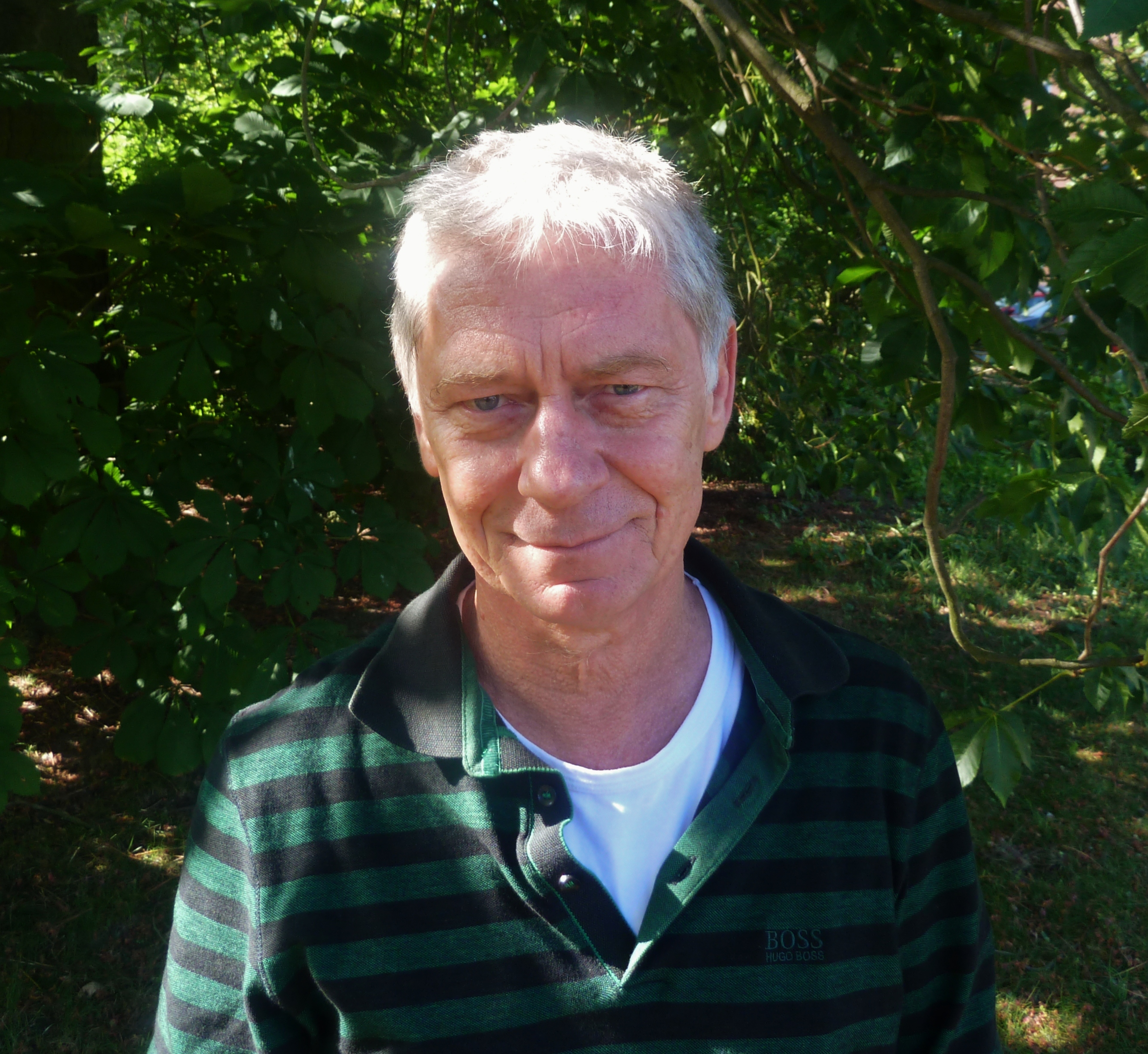 Joachim Tennstedt nach einem Interview in Berlin